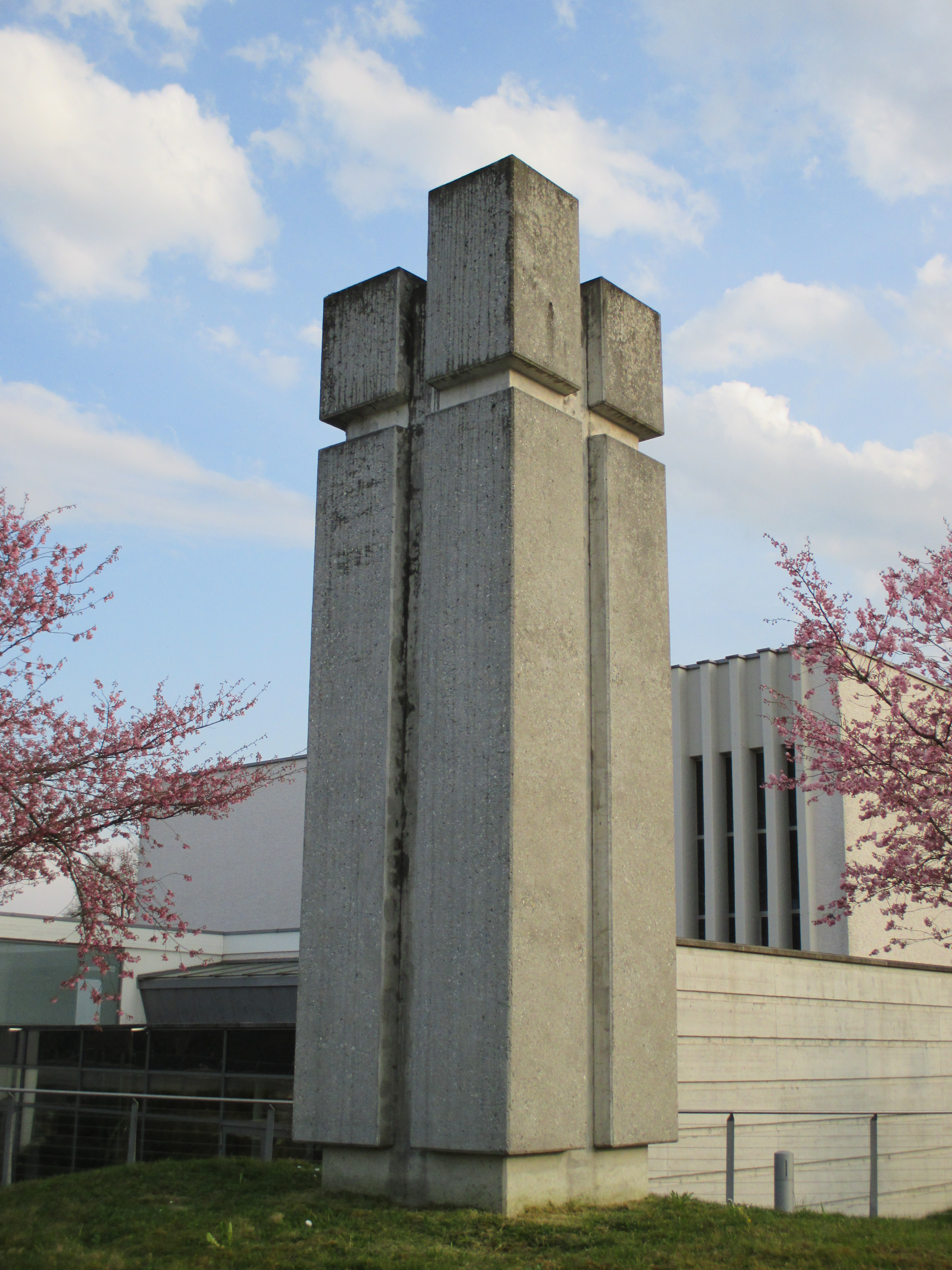 Römisch-katholische Pfarrkirche St. Michael Dietlikon, Säule